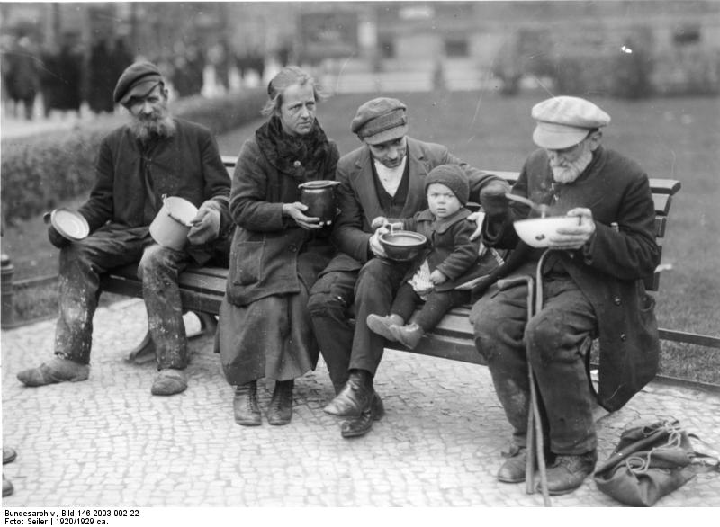 Not der Erwerbslosen in Berlin. [20. Jahre] Arme Arbeitslose verzehren auf einer Bank ihr bescheidenes Mittagsmahl, das sie sich aus der Volksküche geholt haben. Neg. 2216 Sammlung Seiler